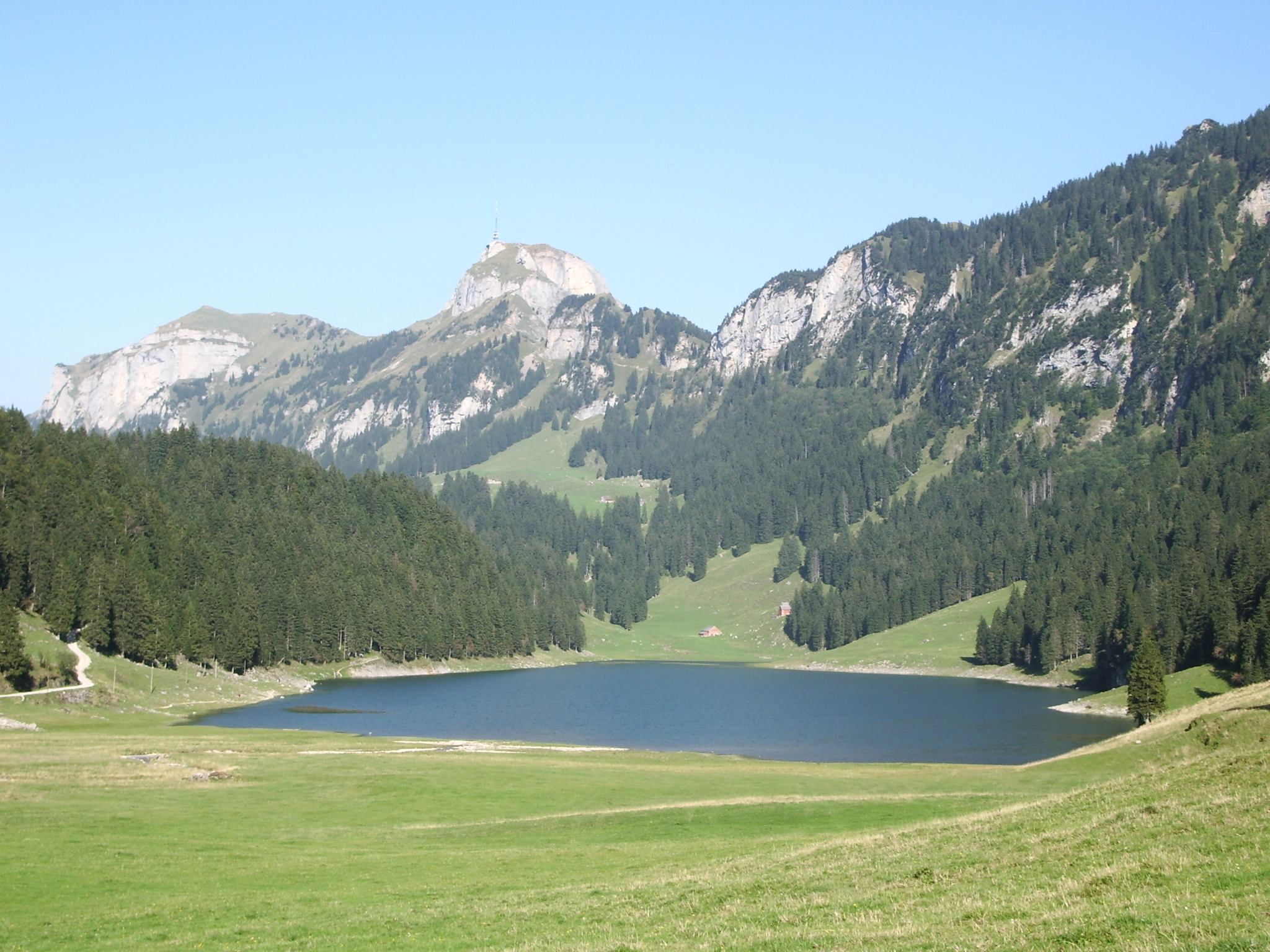 Sämtisersee mit Hoher Kasten und Kamor. Bild selbst gemacht im September 2006.